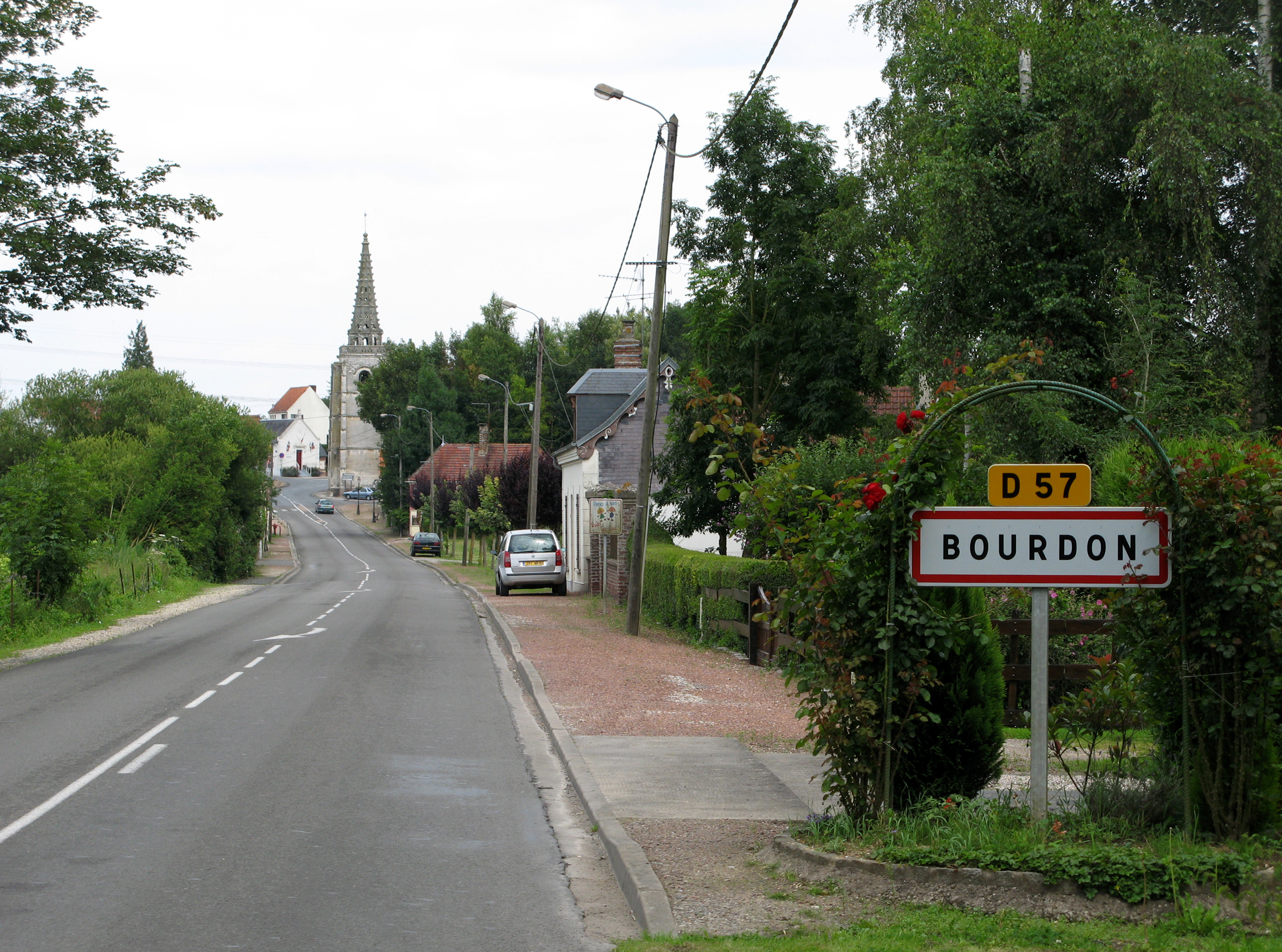 Bourdon (Somme, France) - L'entrée dans la commune, en venant de Hangest-sur-Somme. .